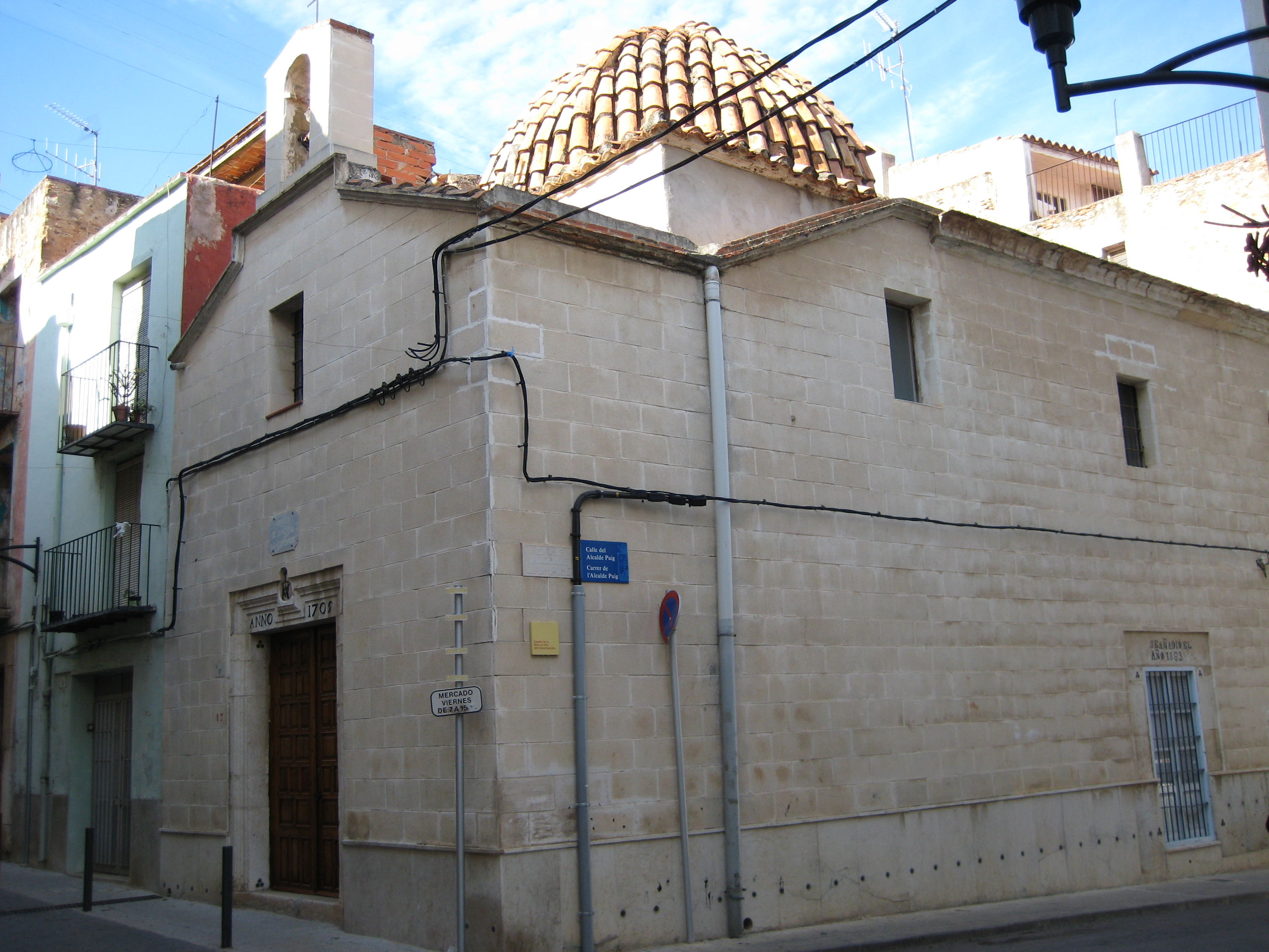 Capella de la Mare de Déu dels Desemparats d'Alcalà de Xivert